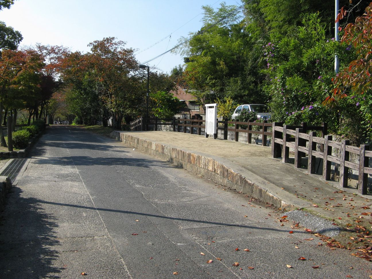 下津井電鉄稗田駅跡 サイクリングロードと模擬プラットホーム（児島方を望む）